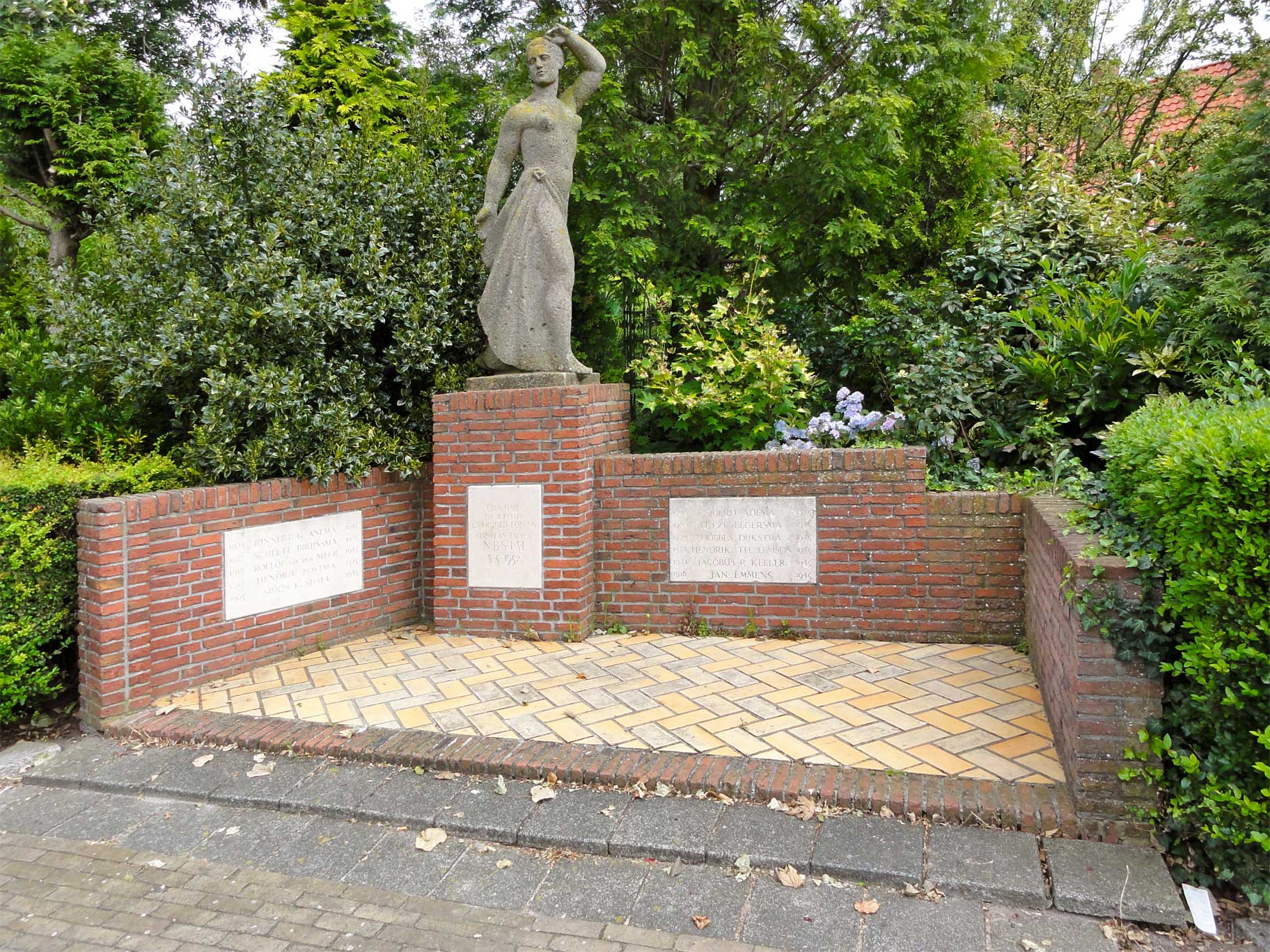 Oorlogsmonument te Makkum door Nina Baanders Kessler